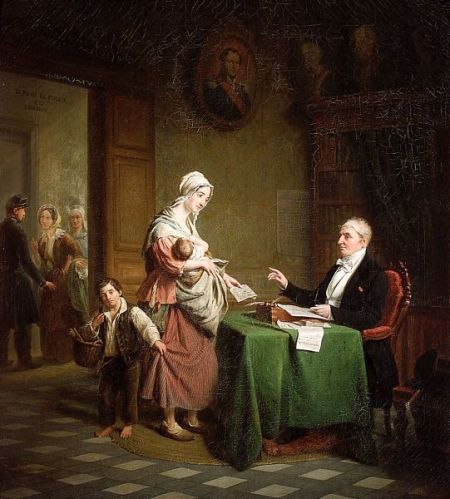 All'ufficio di polizia, olio su tela, collezione privata